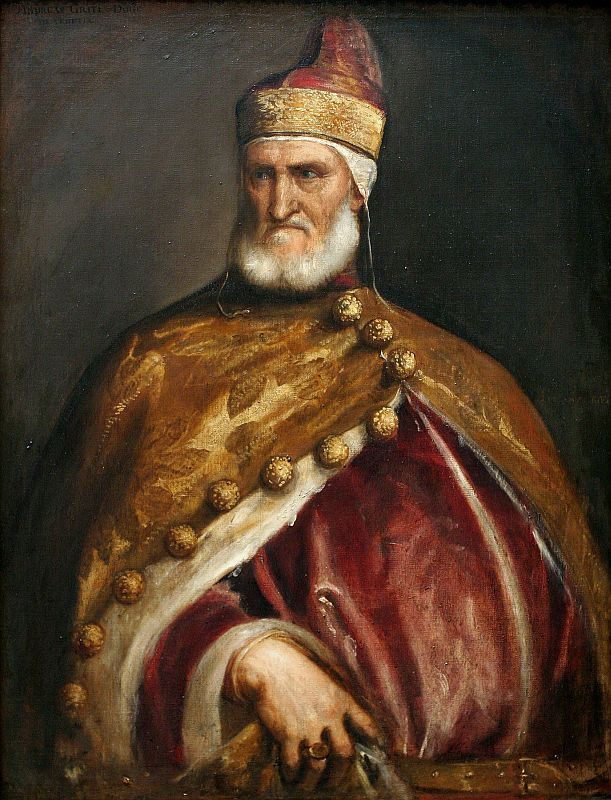 Der Doge Andrea Gritti